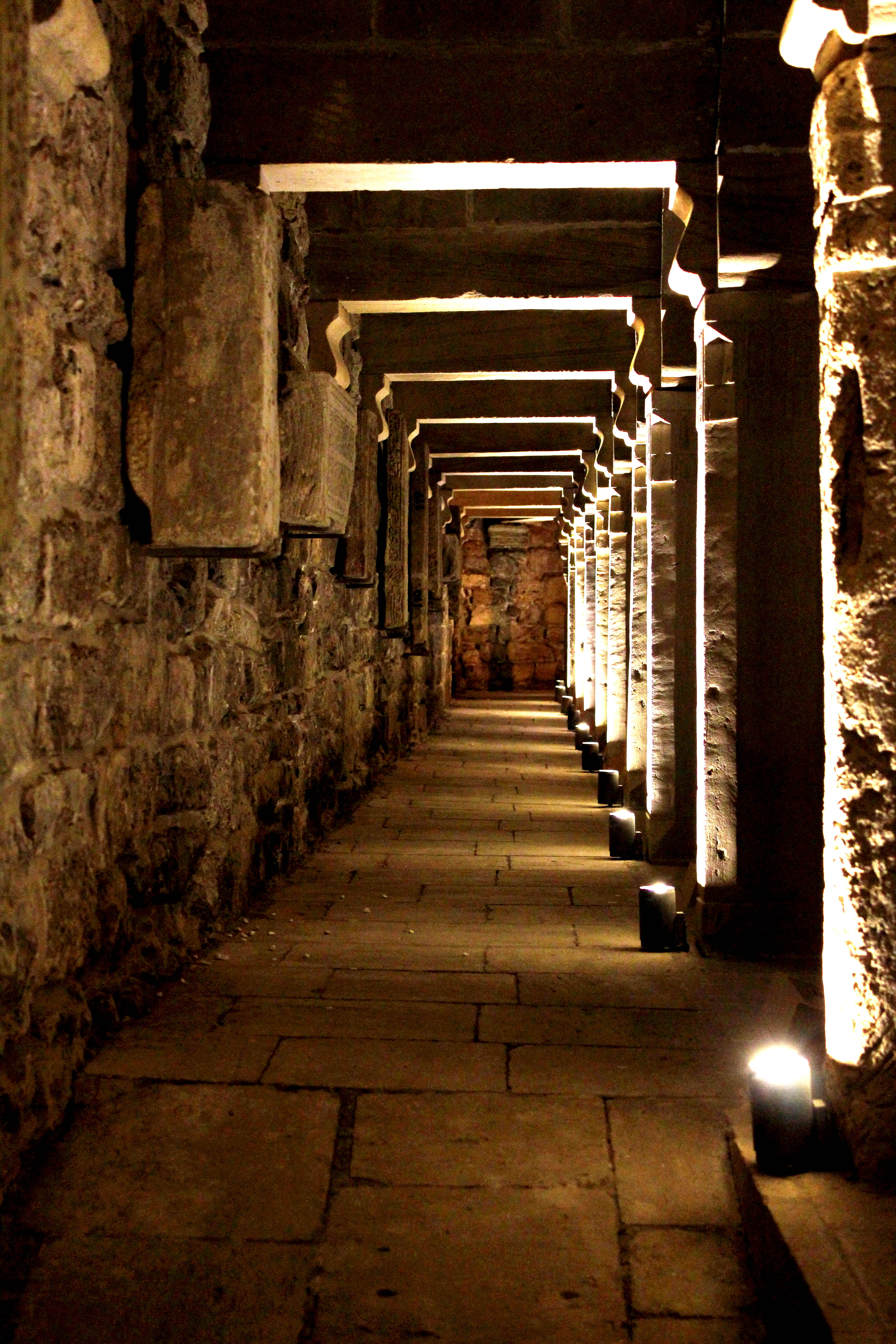 İçərişəhərdə tağlı ibadətgh binası